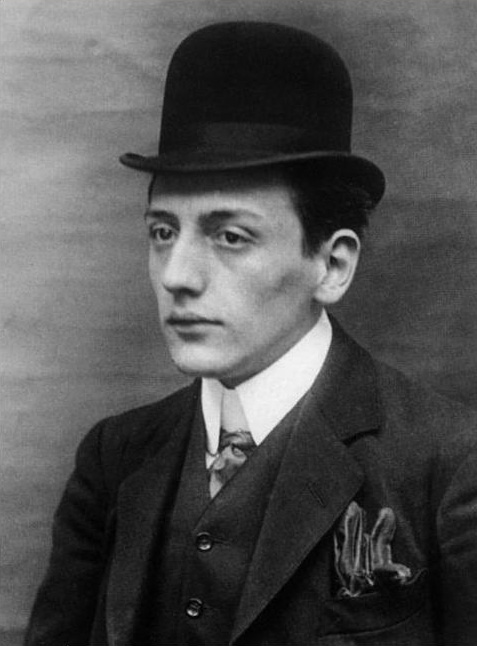 Marcel Allain, vers 1911.